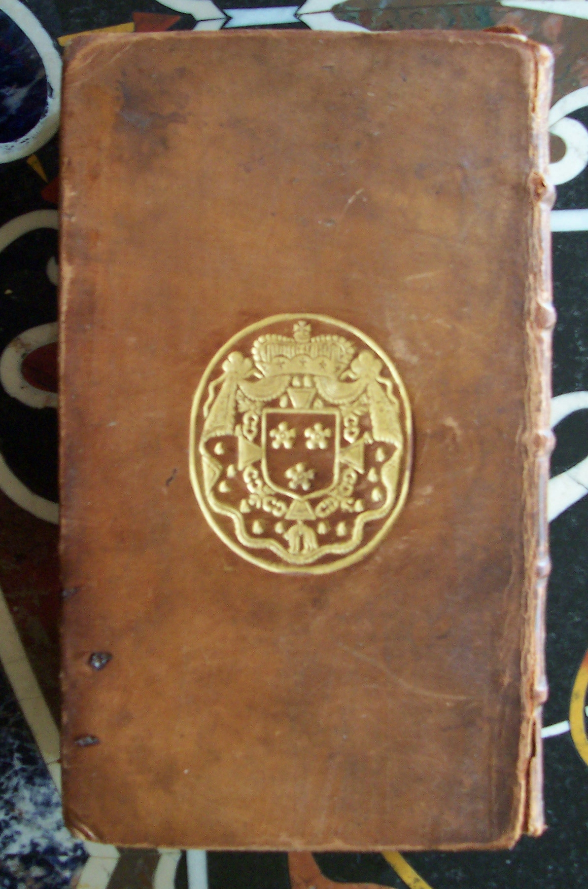 Sur un livre de 1756, armes de Charles-Léopold-Marie-Raymond, duc d’Arenberg, prince du Saint empire romain germanique, maréchal autrichien : Ecu timbré d’une couronne fermée de prince souverain du St empire, sur une grand-croix de l’ordre militaire de Marie-Thérèse, entouré d’un collier de l’ordre de la Toison d’or et posé sur un manteau armorié : « De gueules à trois quintefeuilles d’or »